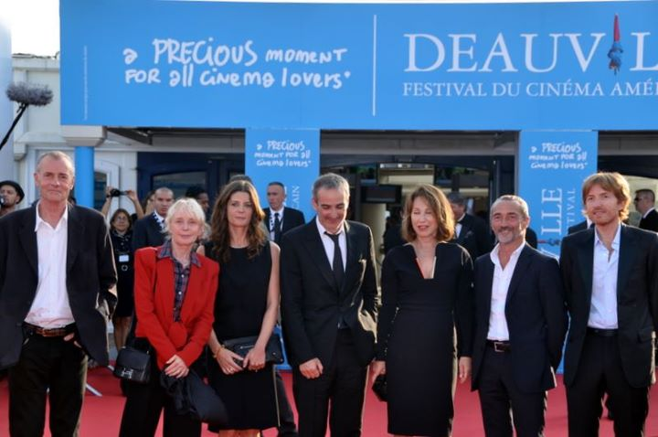 Le jury du festival du film américain de Deauville 2011, de gauche à droite : Jean Rolin, Claire Denis, Chiara Mastroianni, Olivier Assayas (président), Nathalie Baye, Angelin Preljocaj, et Nicolas Godin.